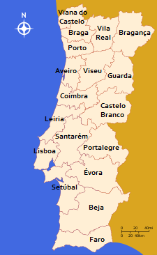 Os 18 distritos de Portugal continental